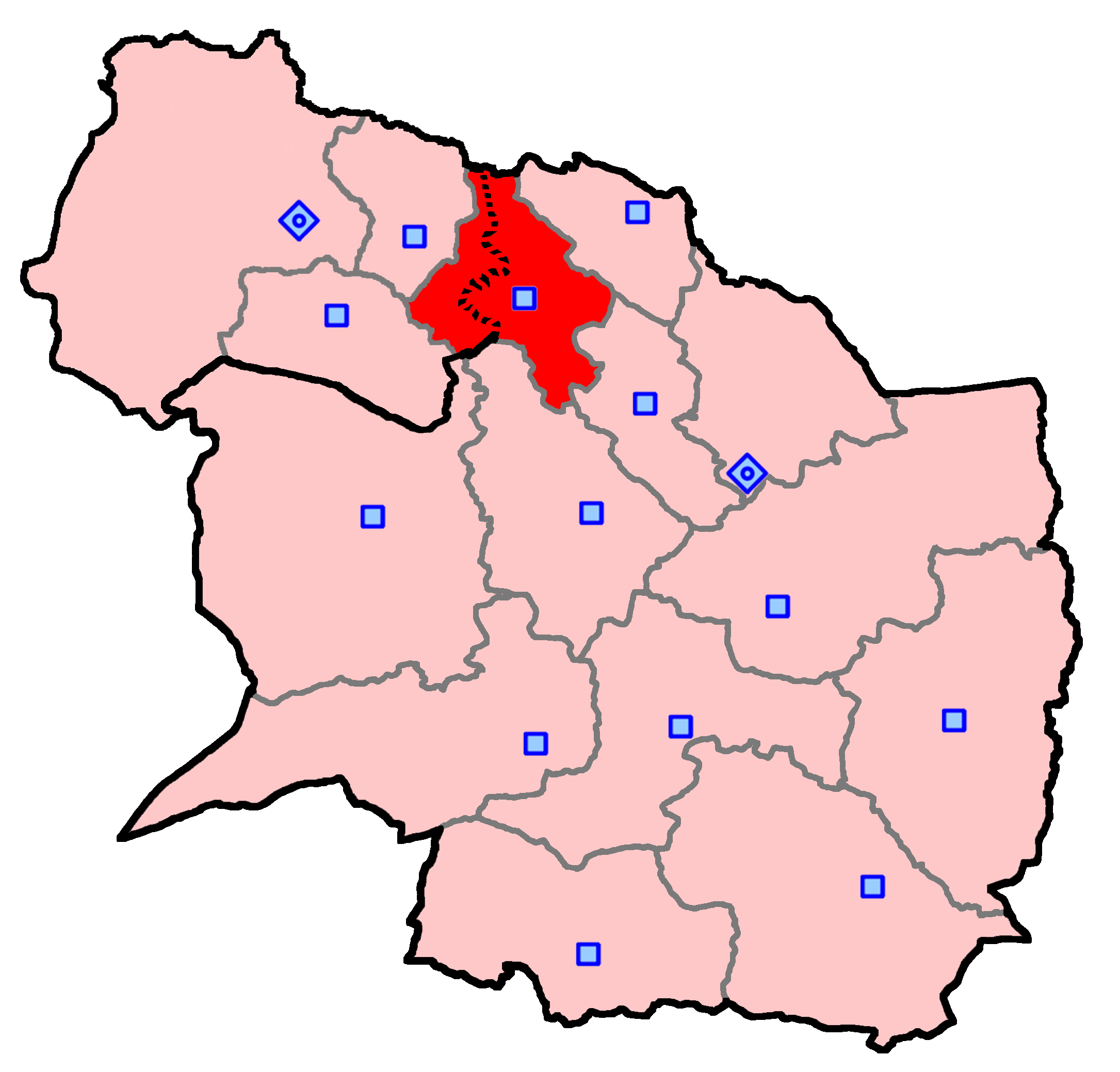 حوزهٔ انتخاباتی قوچان برای انتخابات مجلس شورای اسلامی